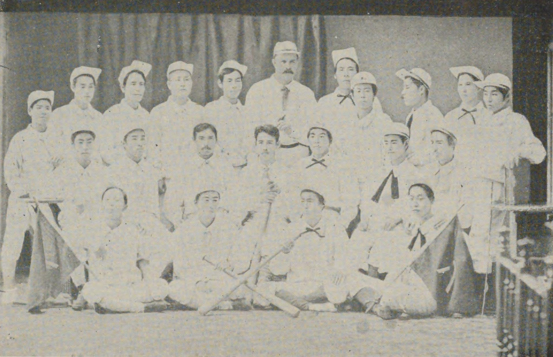 新橋アスレチック倶楽部のメンバーの集合写真。前列左からの写真。中央にいるのが創設者の平岡凞。